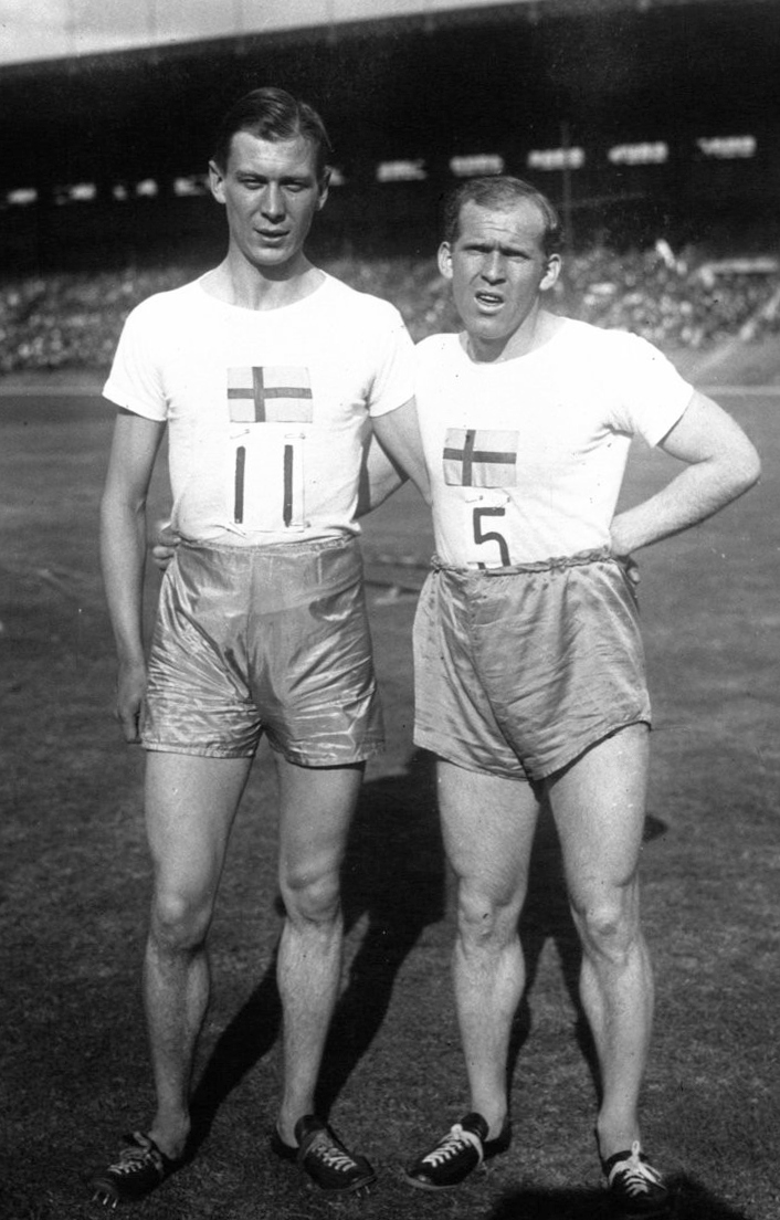 Suède-France athlétisme : 400 m. plat : à gauche, Engdahl, à droite Fosselins : [photographie de presse] / Agence Meurisse